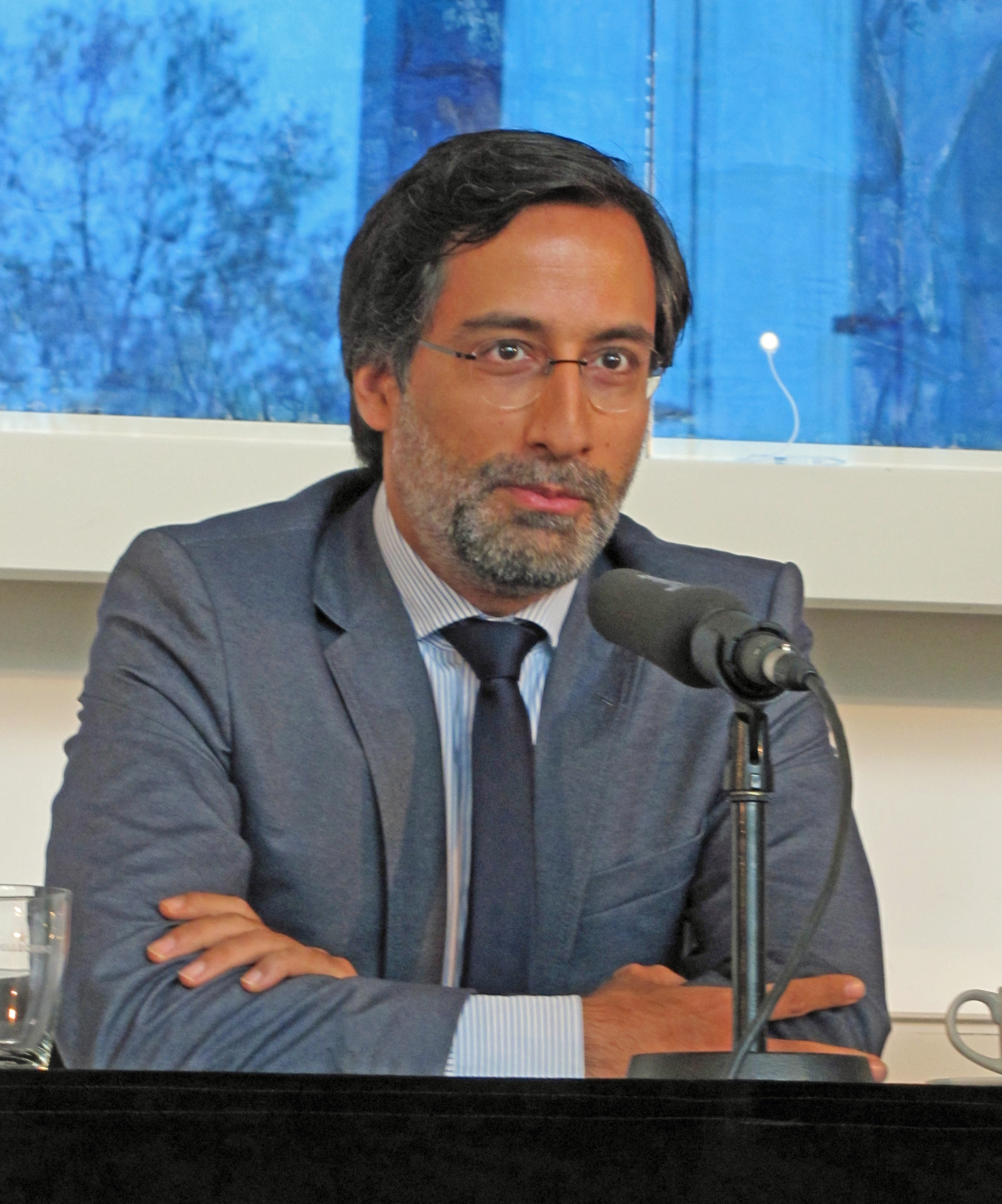 Alexander Görlach, Chefredakteur, Herausgeber und Gründer von "The European", 2013 bei den Römerberggesprächen in Frankfurt am Main.